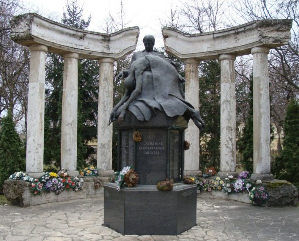 II. világháborús emlékmű, Karcag, 1992. Györfi Sándor szobrász alkotása.